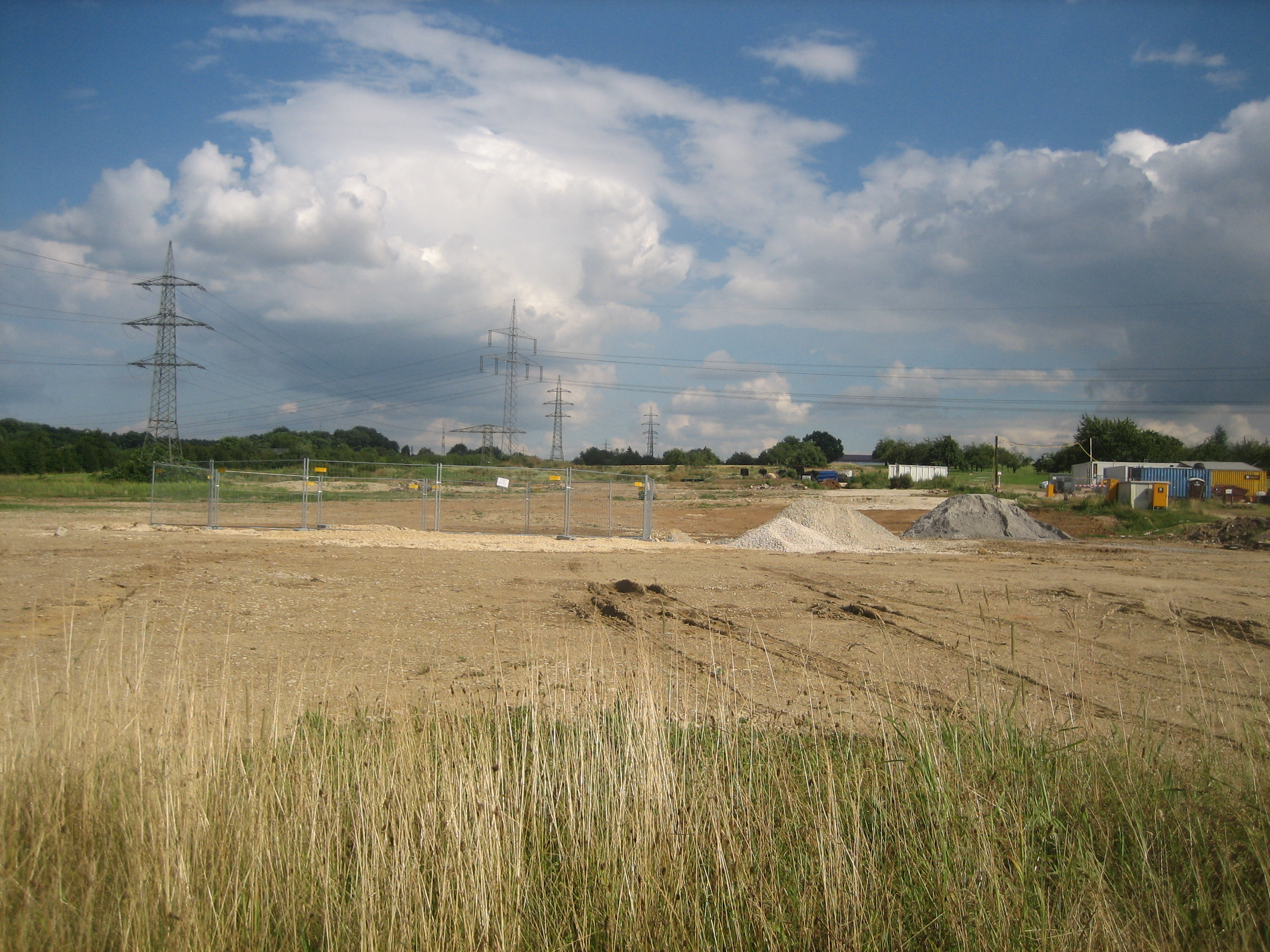 Albvorlandtunnel Wendlingen, Baustelleneinrichtung 2016